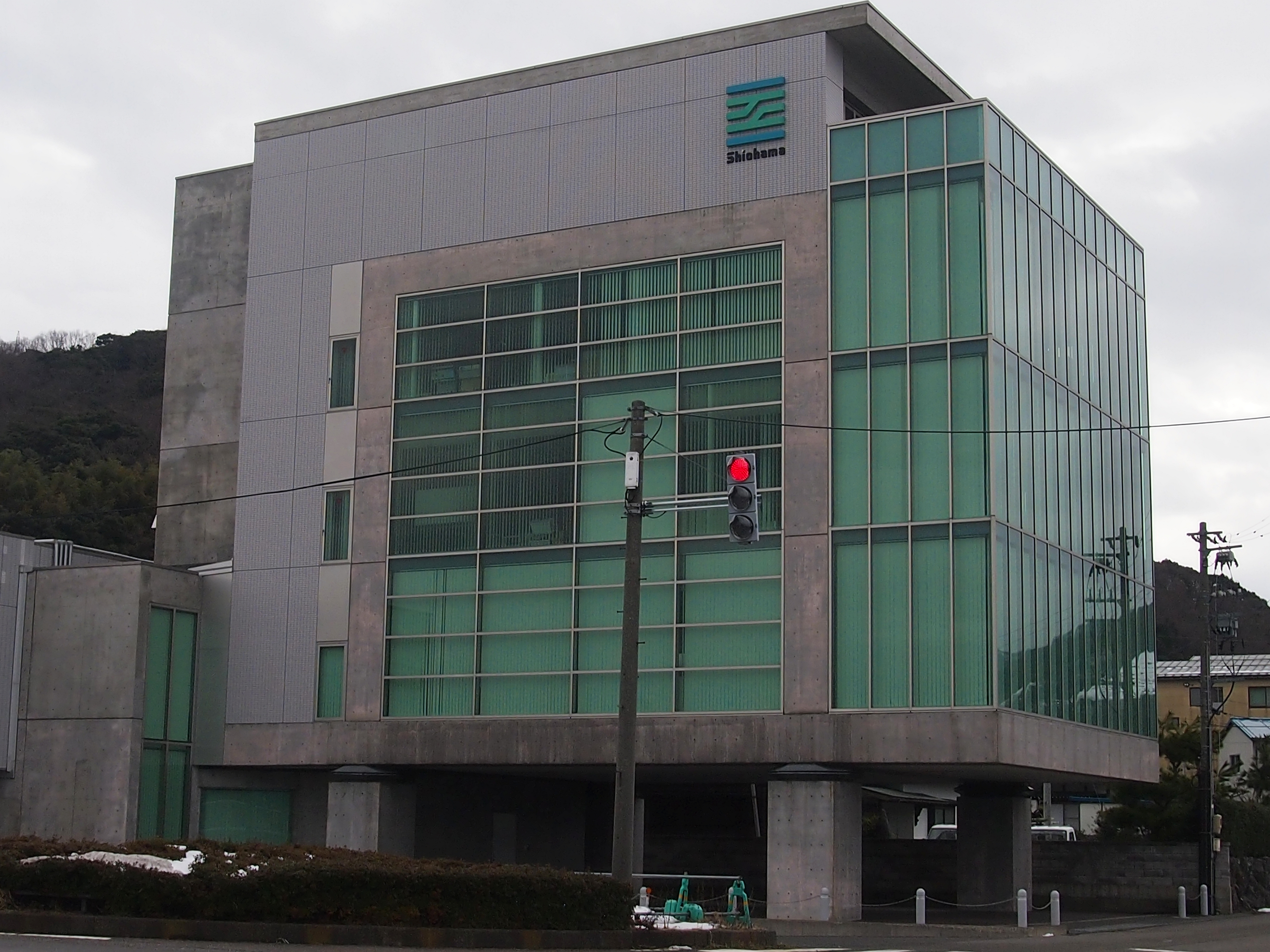 福井県敦賀市に本社のある総合建設業の株式会社塩浜工業。